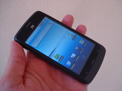 ZTE Blade без операторских логотипов.